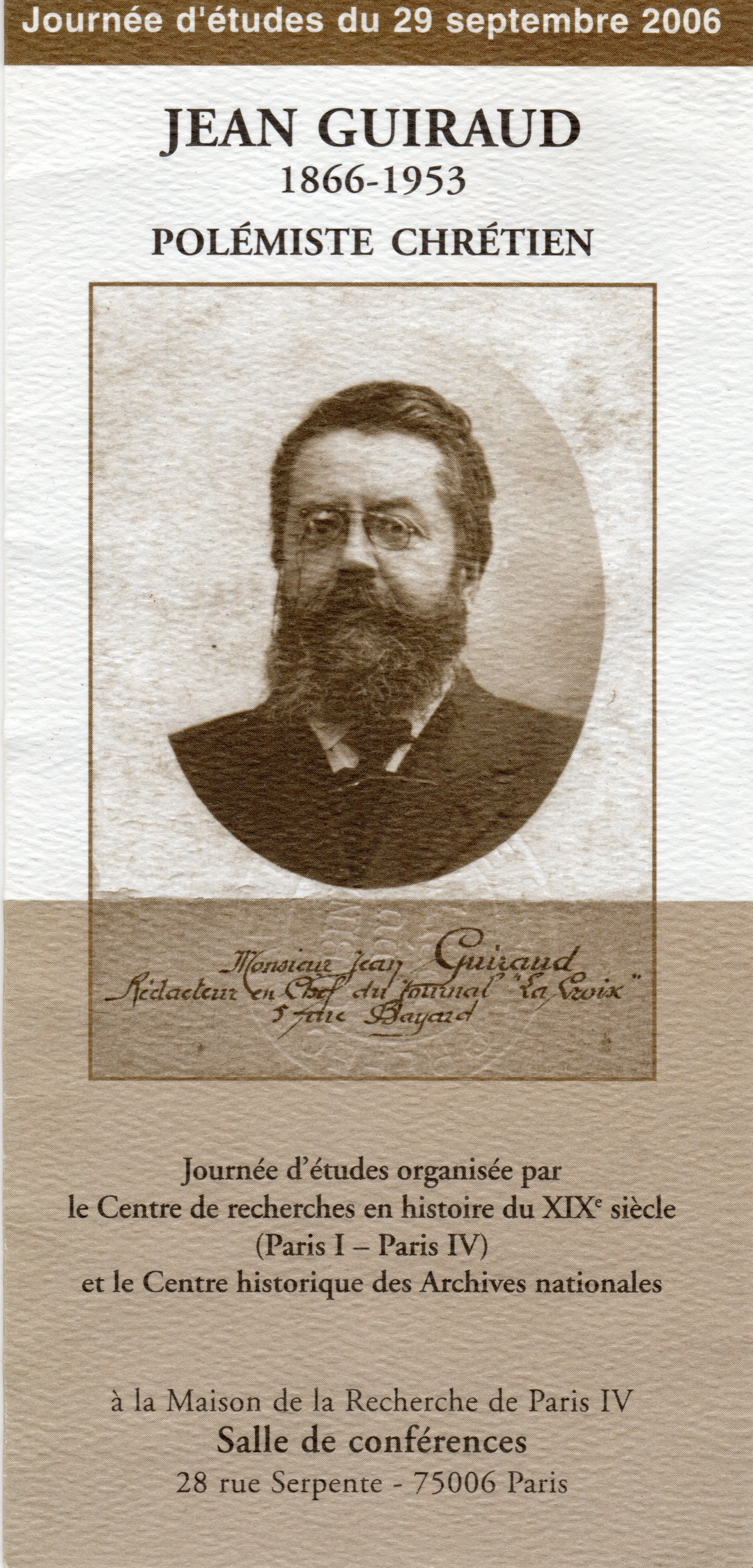 Prospectus de la journée d'études Jean Guiraud du 29 septembre 2006 par le C.H.A.N.